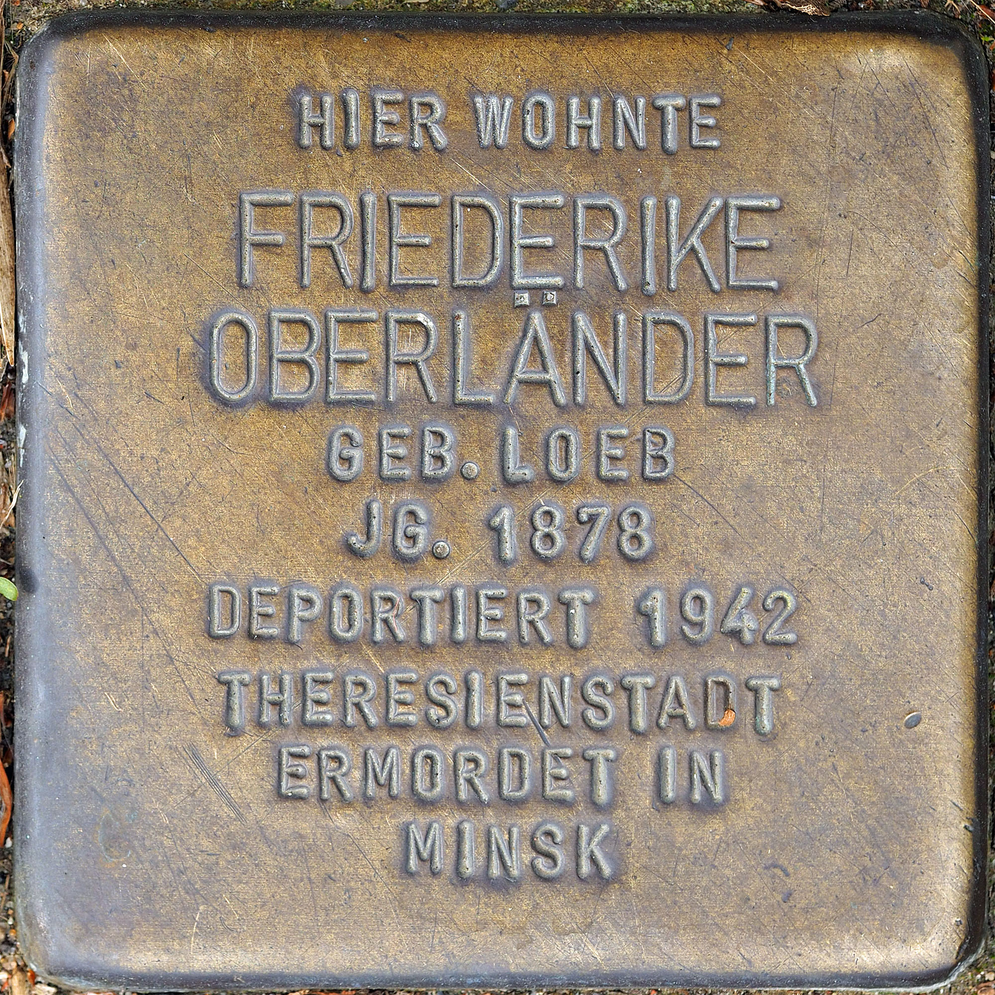 Stolpersteine MG: Oberländer, Friederike